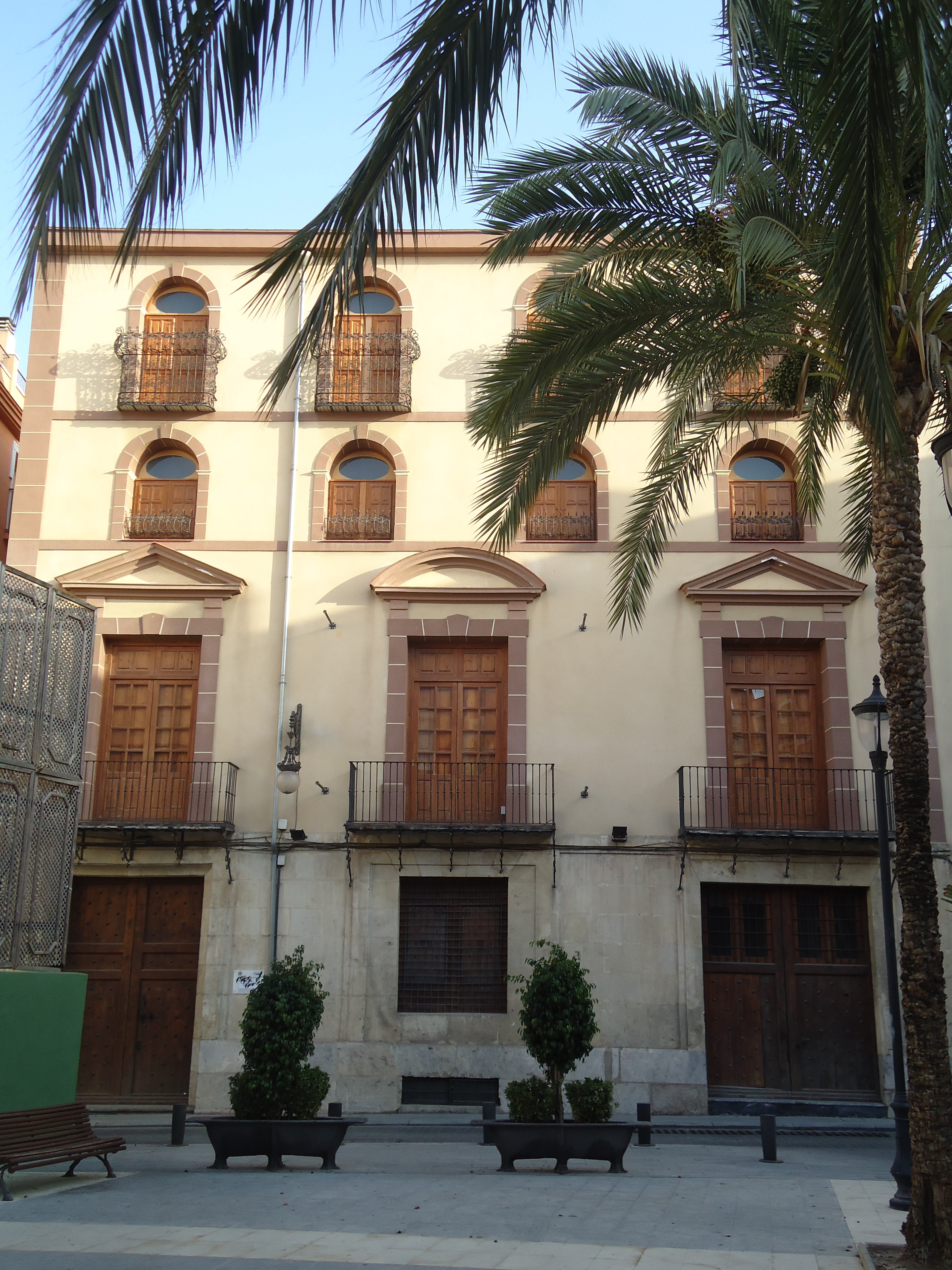 Fachada delantera del palacio Sorzano de Tejada, en Orihuela (Comunidad Valenciana, España)